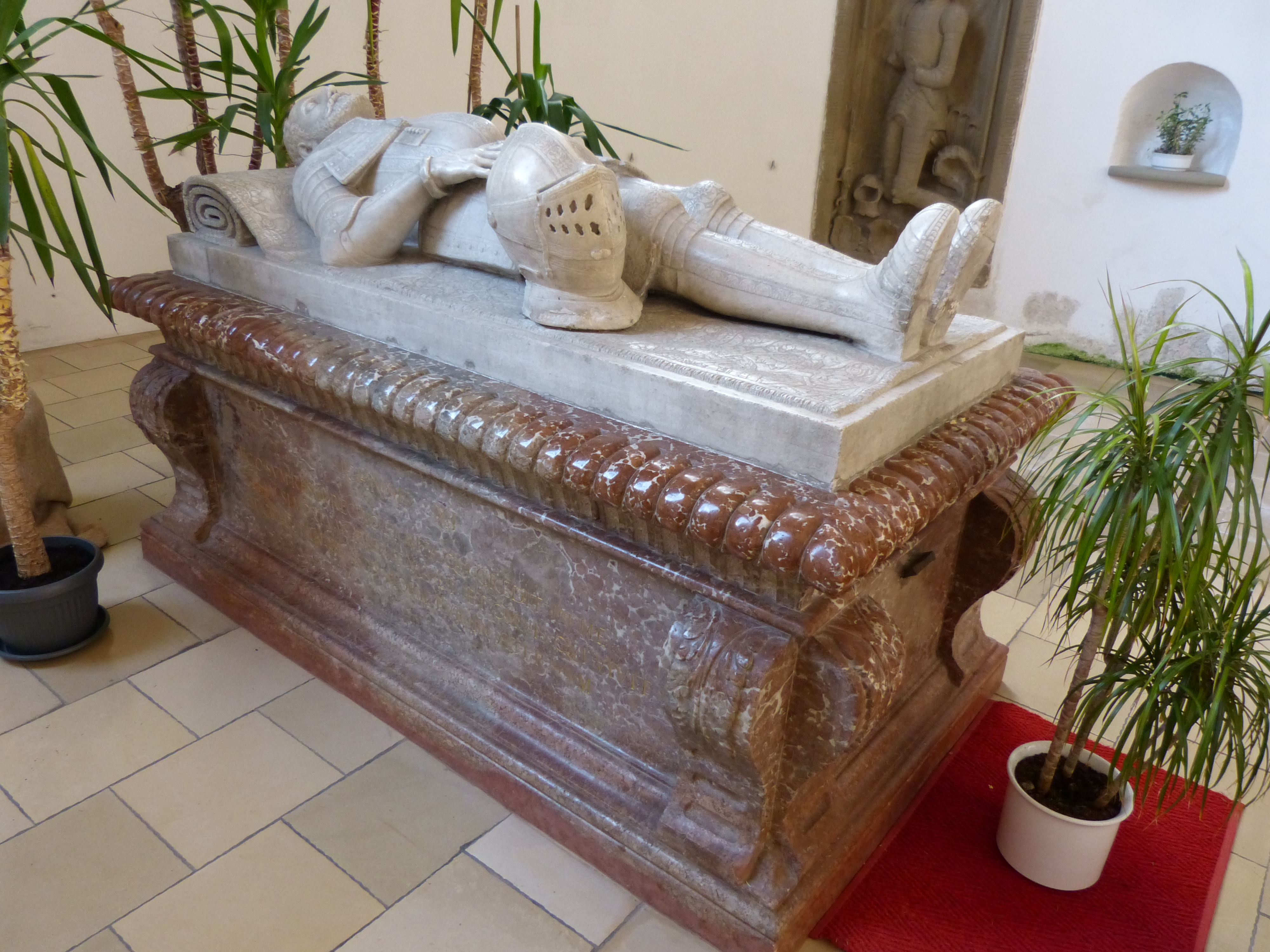 St. Peter und Paul, Kirchheim in Schwaben, Landkreis Unterallgäu, Bayern